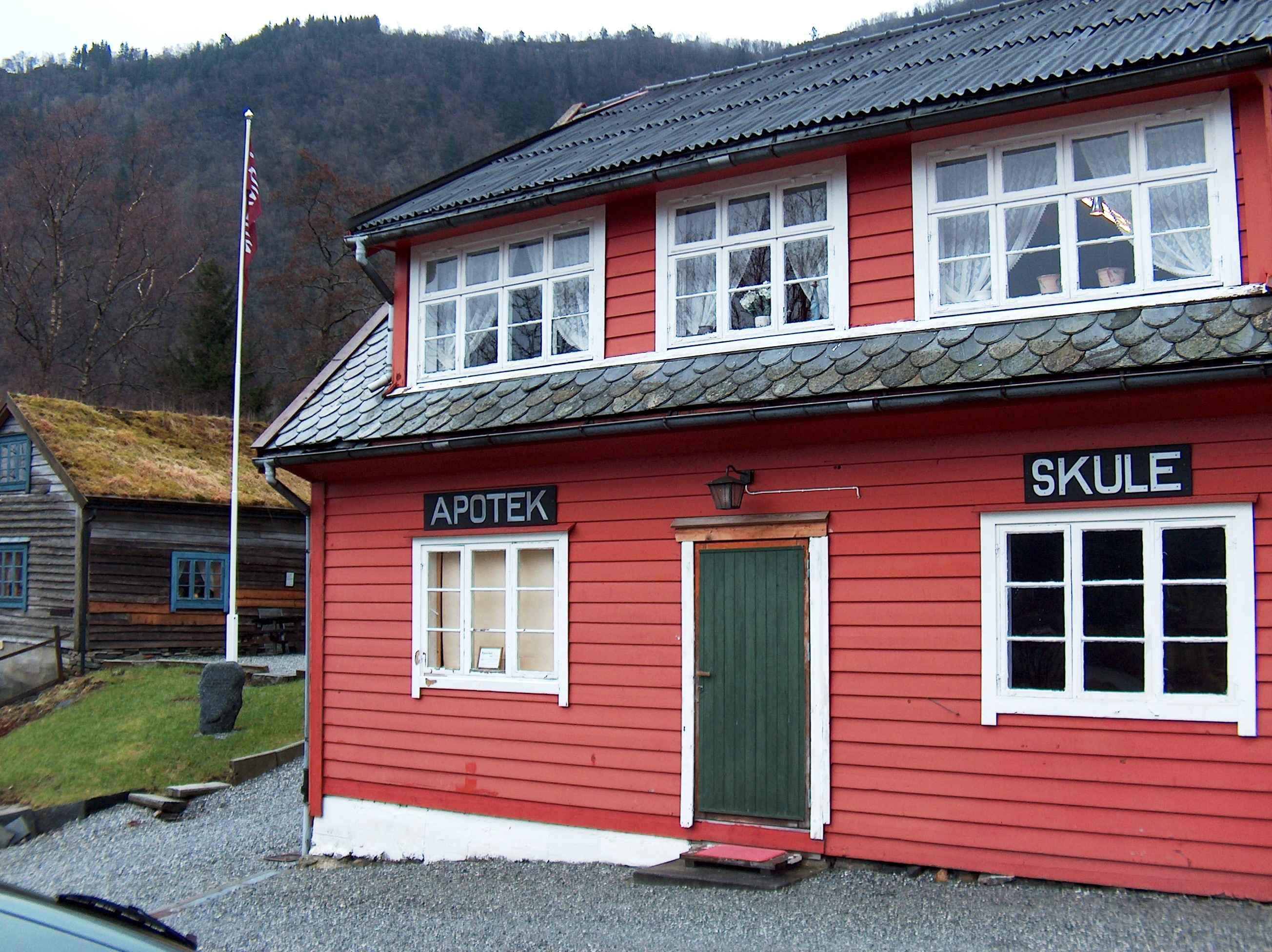 Ådnabu II, Ådnatun museum